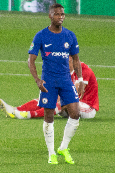 League Cup 20.9.17